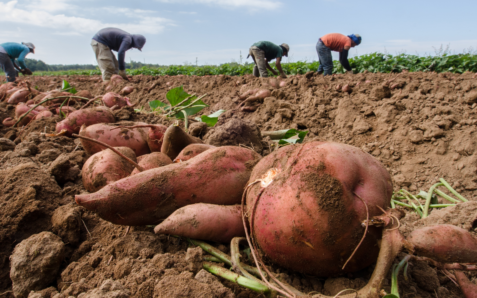 Quatre hommes récoltant des patates douces rouges.